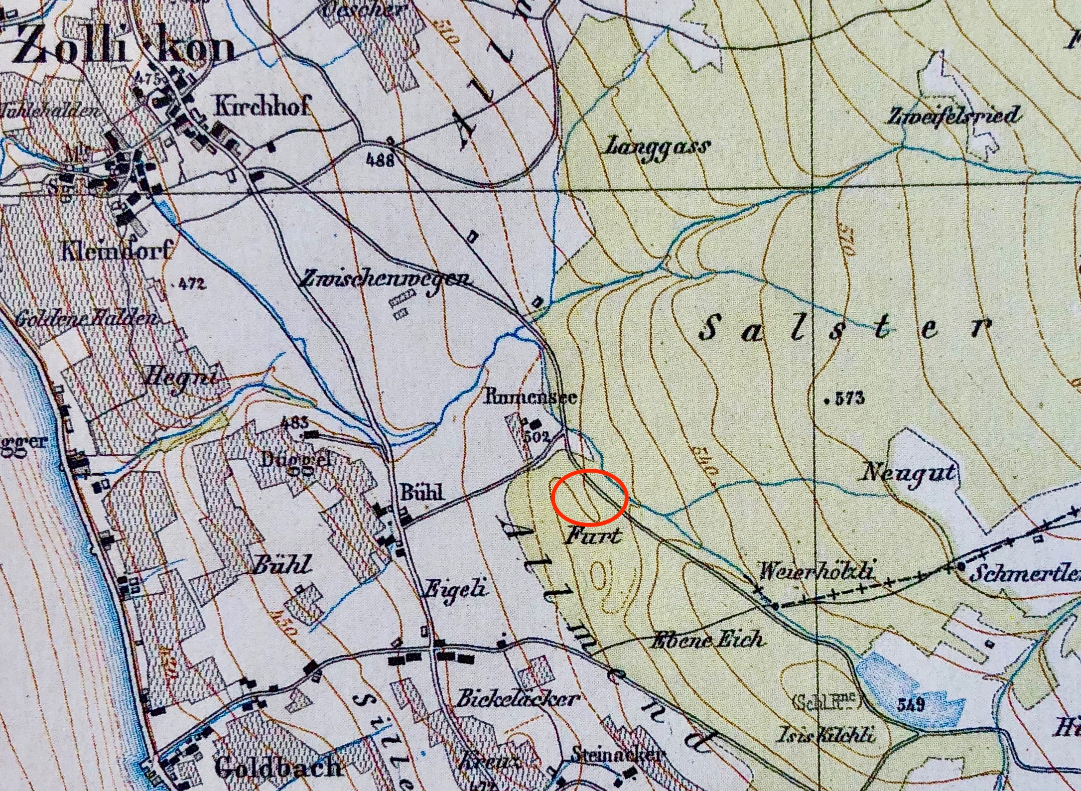 Lage des Rumensees vor 1723 auf der Wild-Karte aus der Zeit um 1850